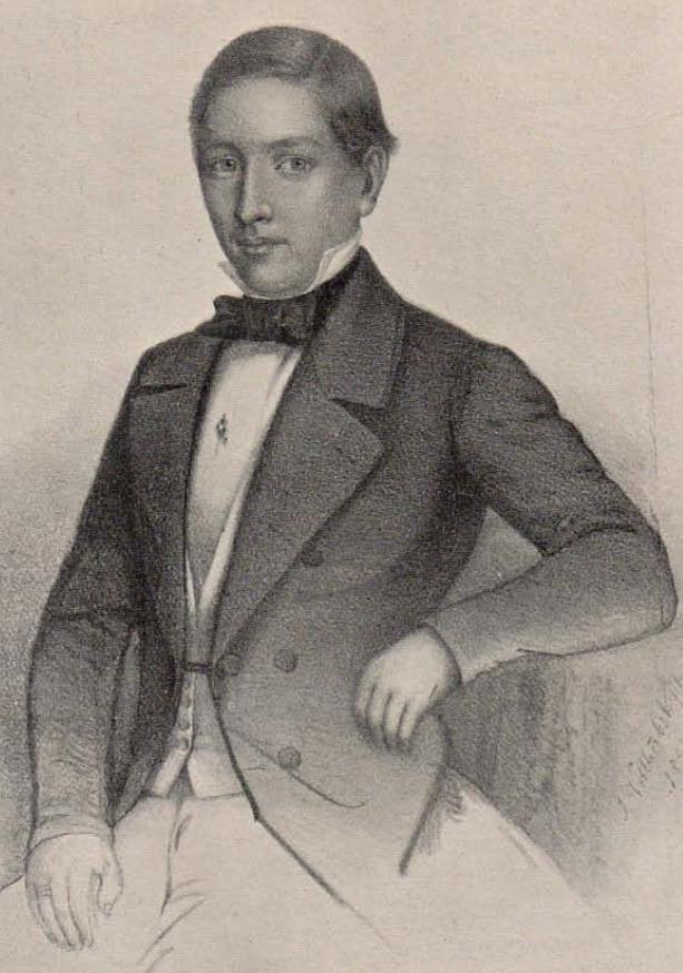 Justizrat, aktiv 1850-1851 und 1852-1853/1854; erster Fuchs Schottlands